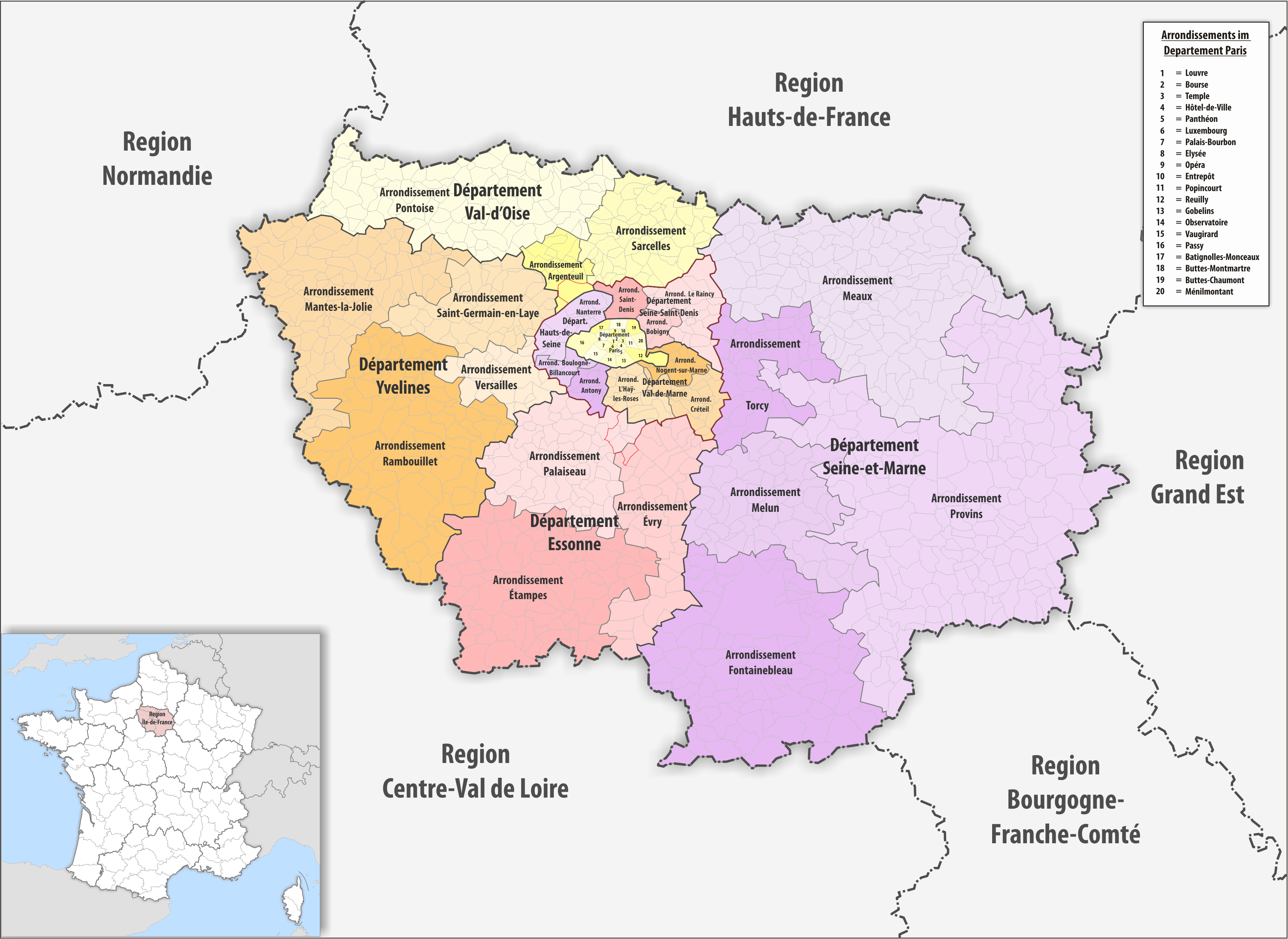 Gemeinden, Arrondissemente und Departemente in der Region Île-de-France